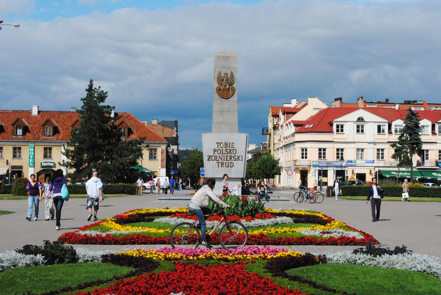 Plac Wolności Włocławek